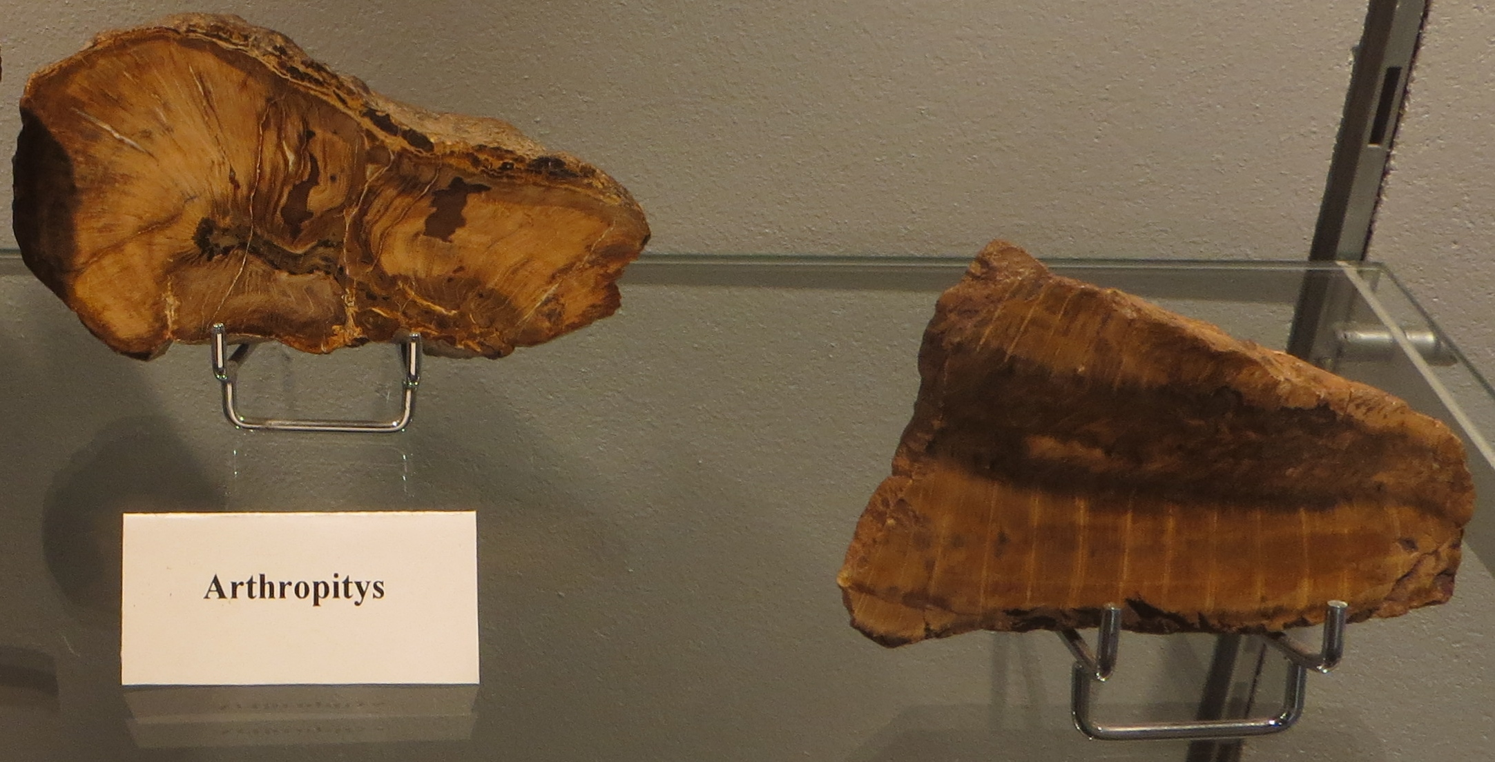 Fossil - Took the picture at Museum of Natural History, Autun